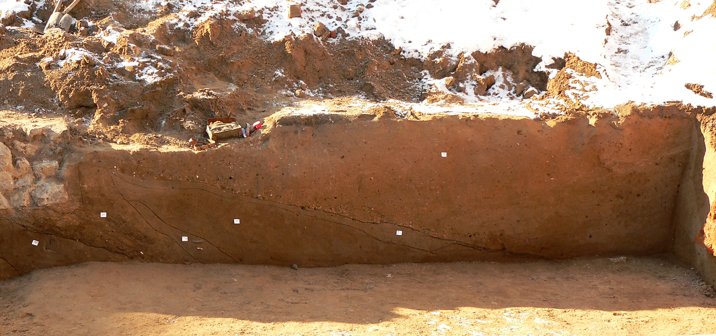 Ausgrabungsfläche auf dem Marstallplatz im westlichen Bereich, freigelegte Stratifikation